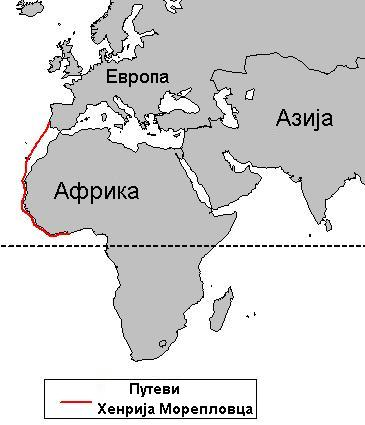 Путеви Енрикеа Морепловца Превод слике са оставе :commons:Image:Routes d'Henri le Navigateur.JPG Аутор: Guilhem06